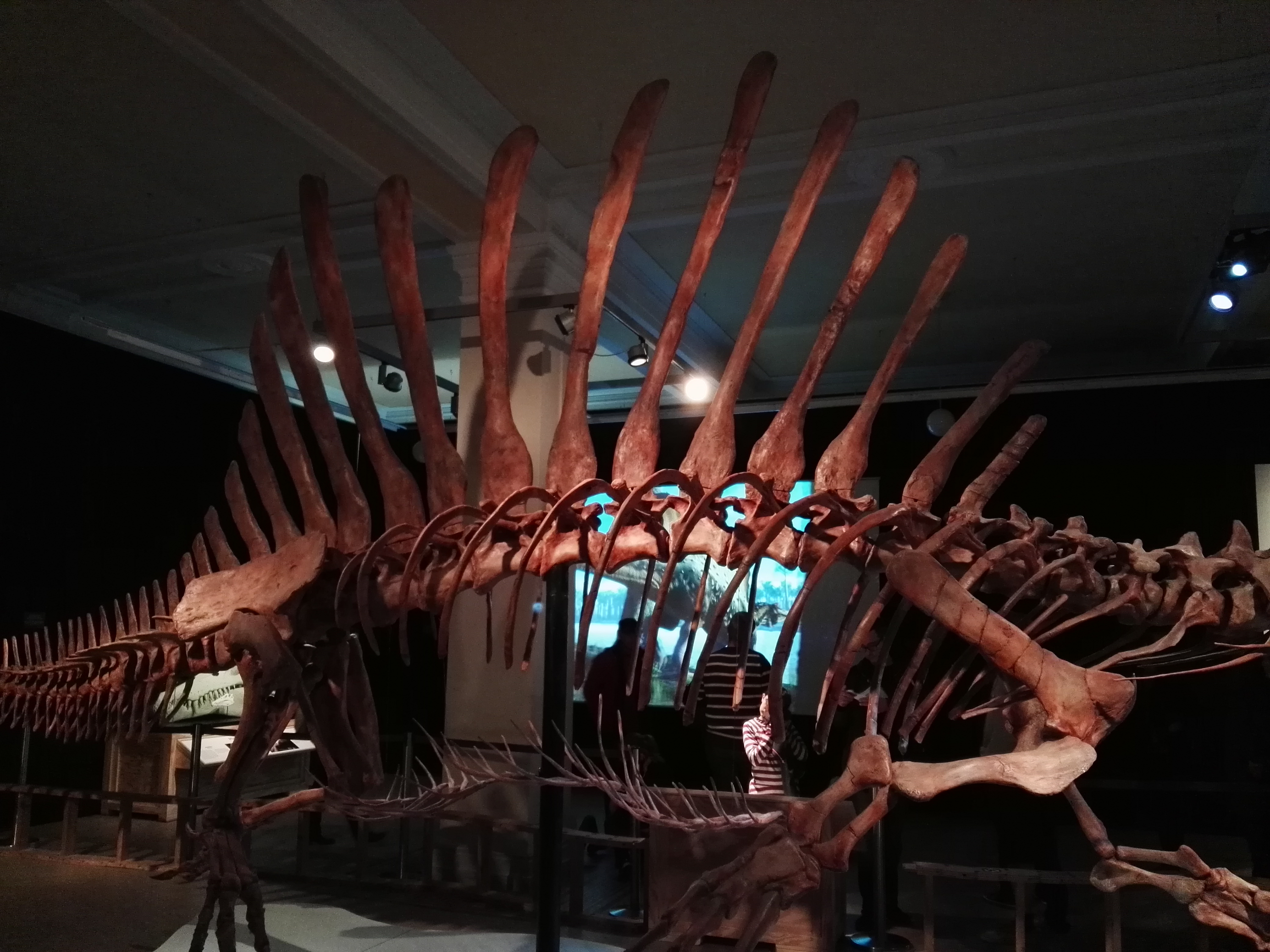 Mittelteil des Spinosaurus im Museum für Naturkunde in Berlin